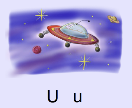 Deutsche Anlauttabelle (mit Großbuchstaben und Kleinbuchstaben) für das Erstlesen in Grundschulen – Ausschnitt mit Ufo als Beispiel für den Buchstaben U/u